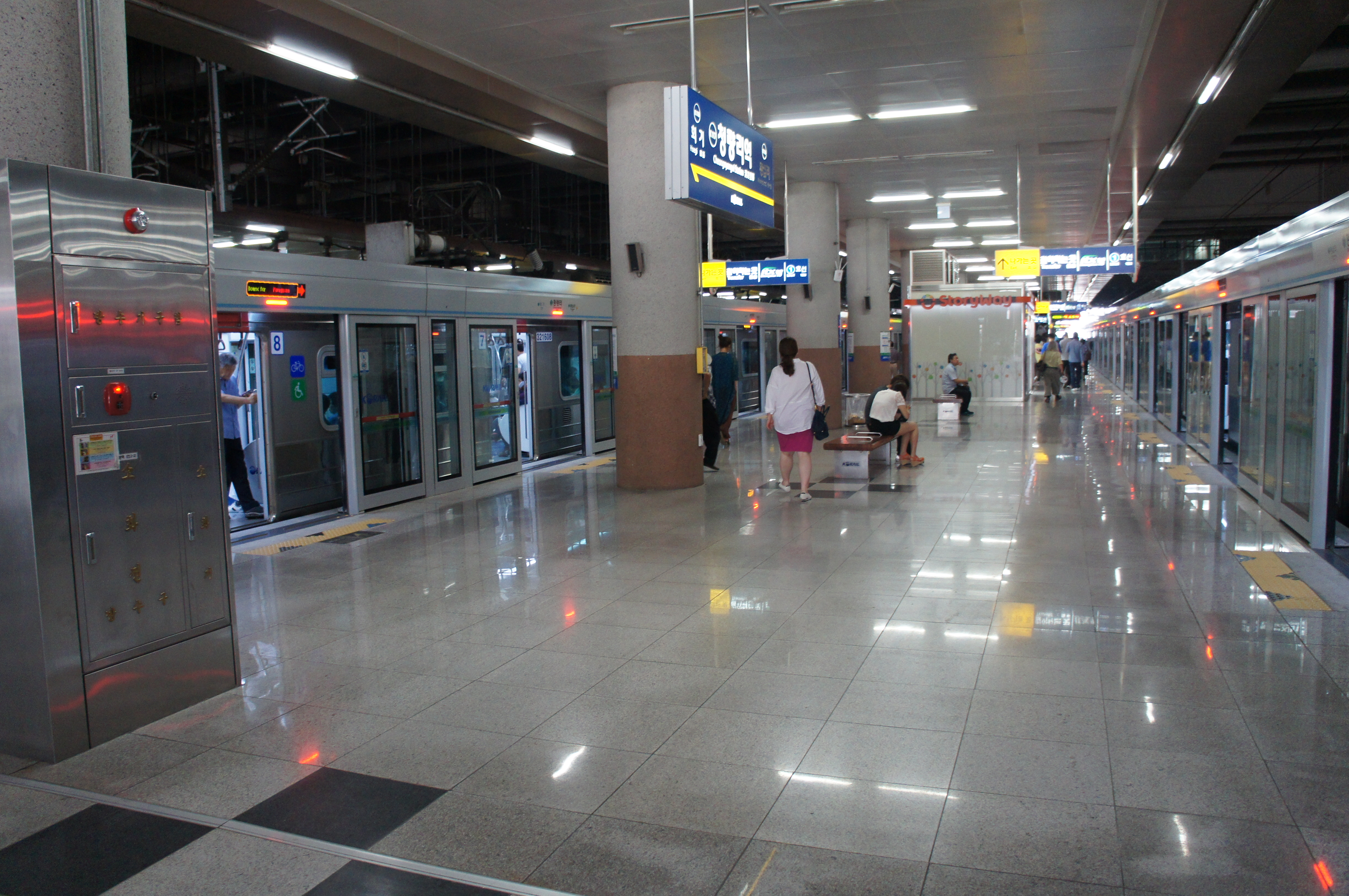 청량리역 3/4번 승강장